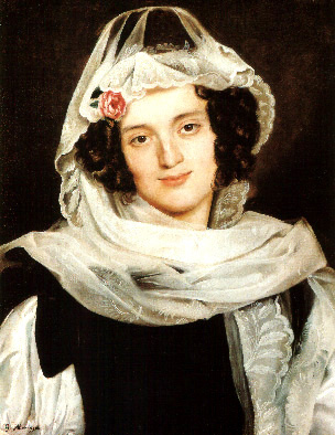 Ritratto di Giulia Fusi Manusardi, olio su tela, 52 x 42 cm., Pinacoteca civica, Caravaggio